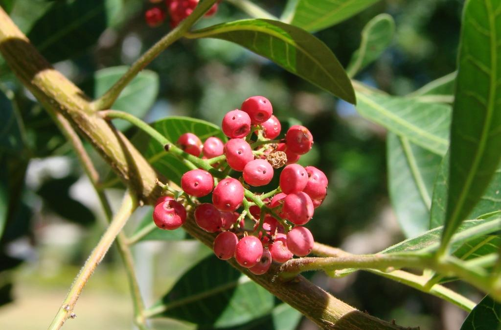 Schinus terebinthifolius Raddi - ANACARDIACEAE - Parque Olhos D'Água - Brasília - Distrito Federal - Brasil.